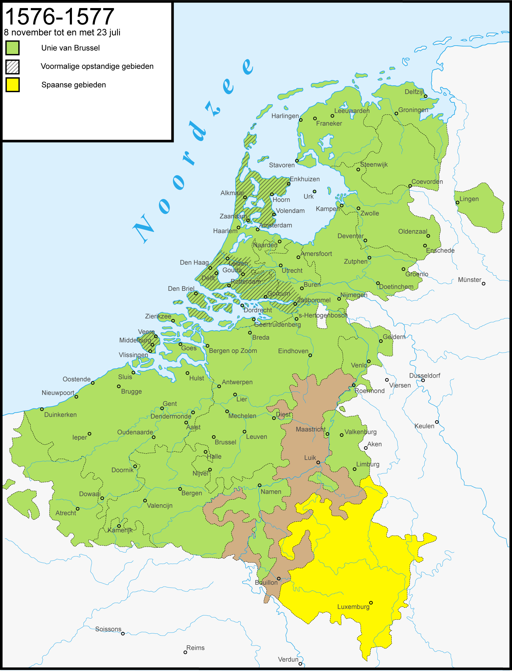 Krijgsbewegingen in de Tachtigjarige Oorlog: 8 november 1576 tot en met 23 juli 1577. Nederlandse versie Engels: Warprogression in het Eighty Years' War: 8th November 1576 till 23rd July 1577. Dutch version